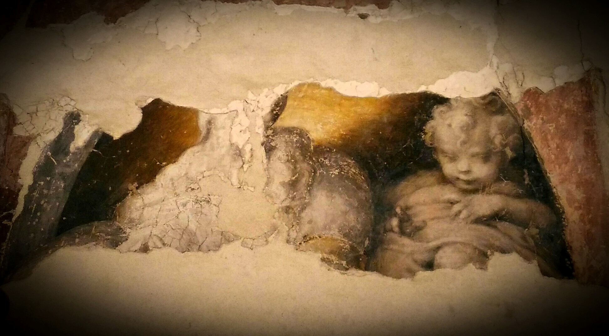 palazzetto Eucherio Sanvitale